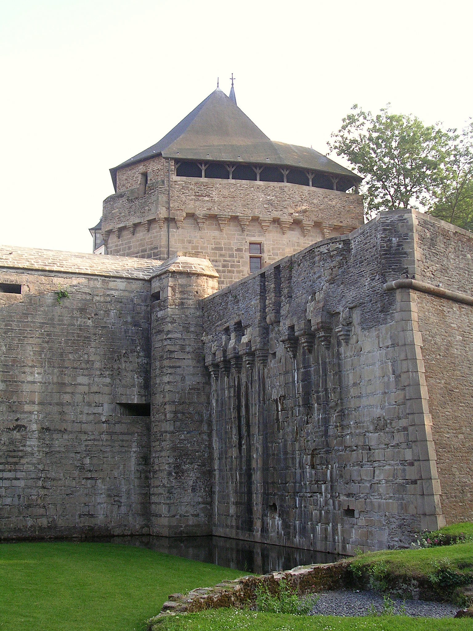 Château des ducs de Bretagne, le Vieux Donjon. Nantes (France)